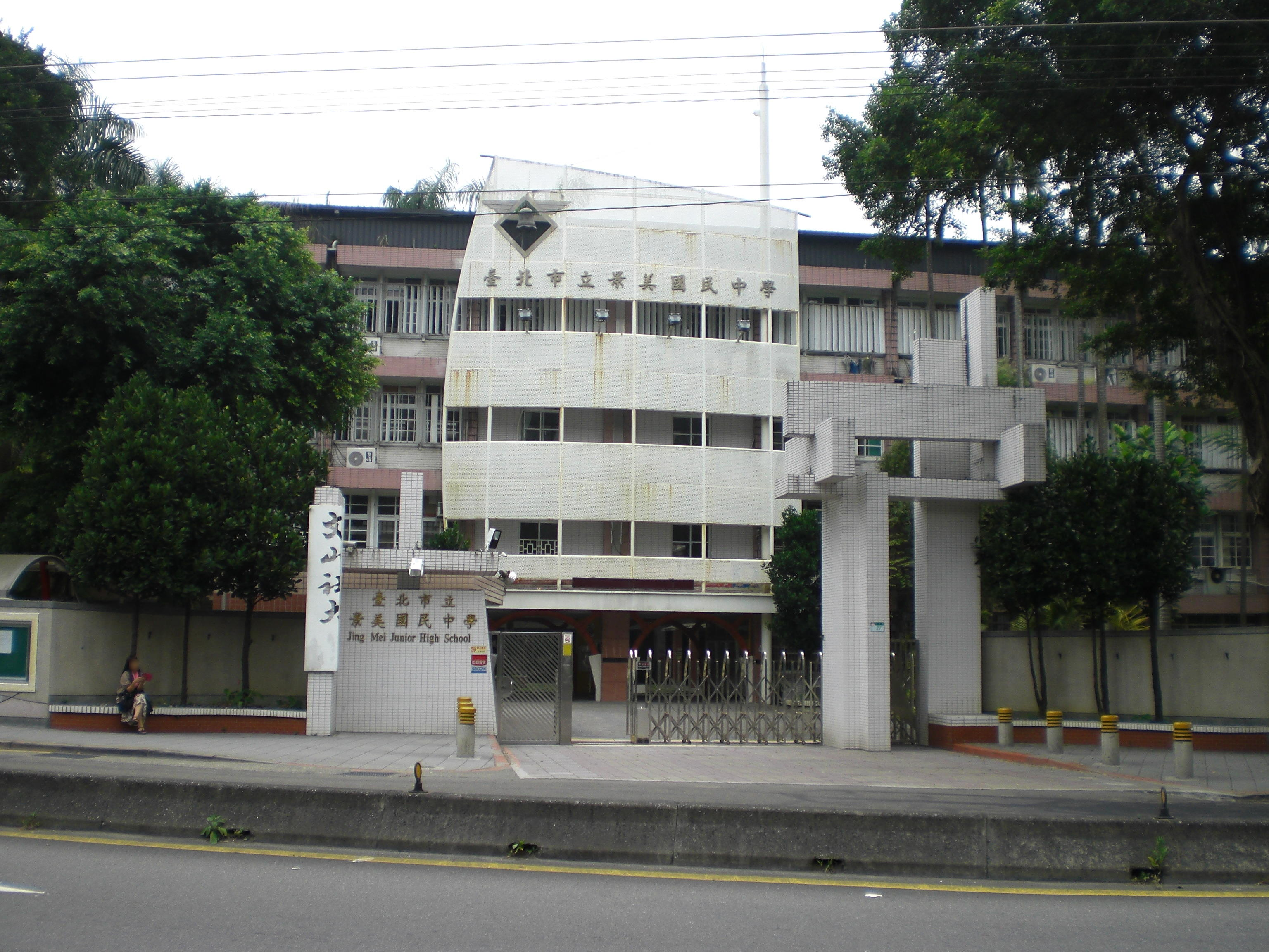 臺北市立景美國民中學，位於臺北市文山區景中街27號。臺北市文山社區大學校本部設於此。